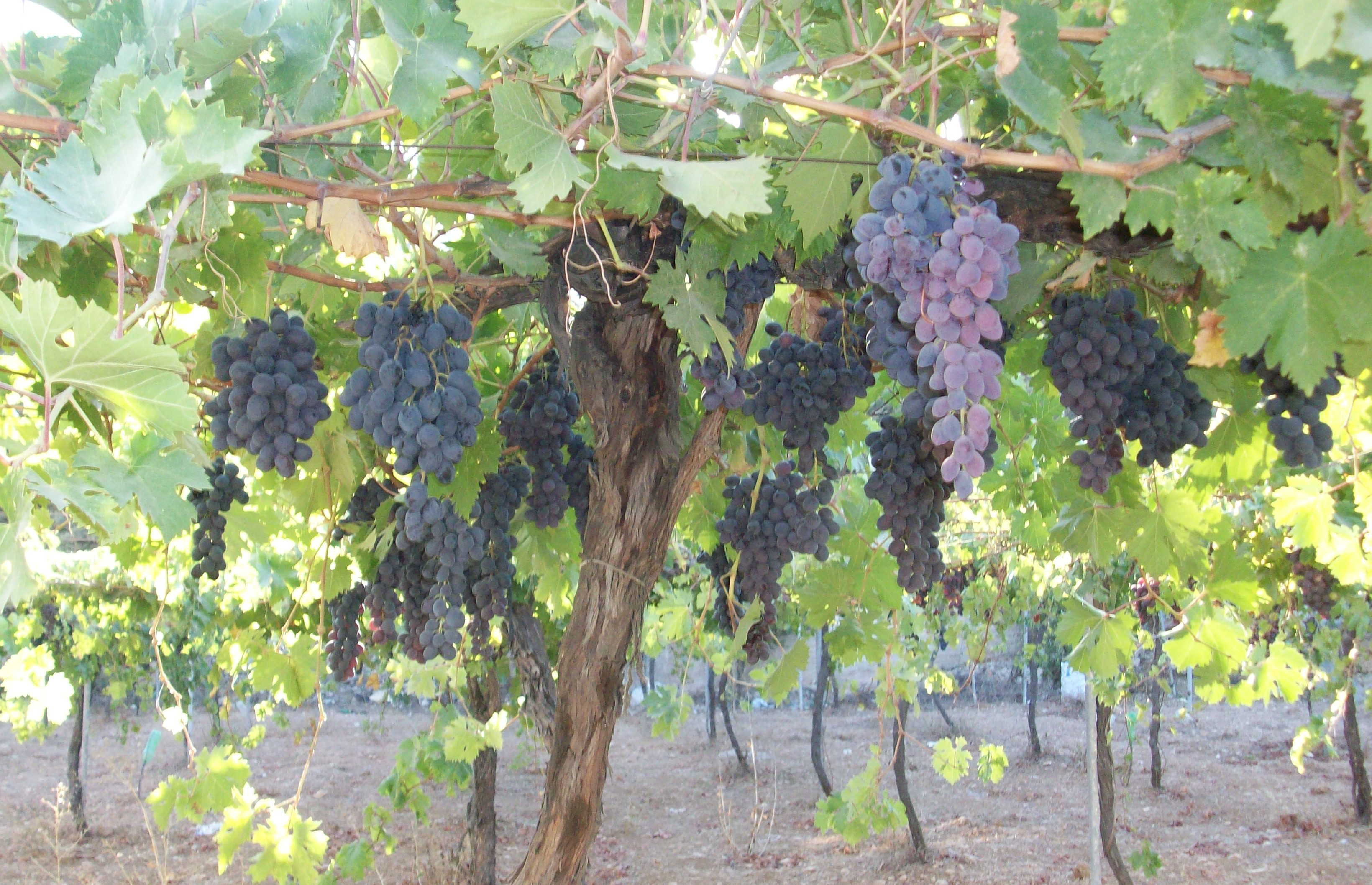 قطوف العنب الخليلي ويعد من أجود أنواع العنب